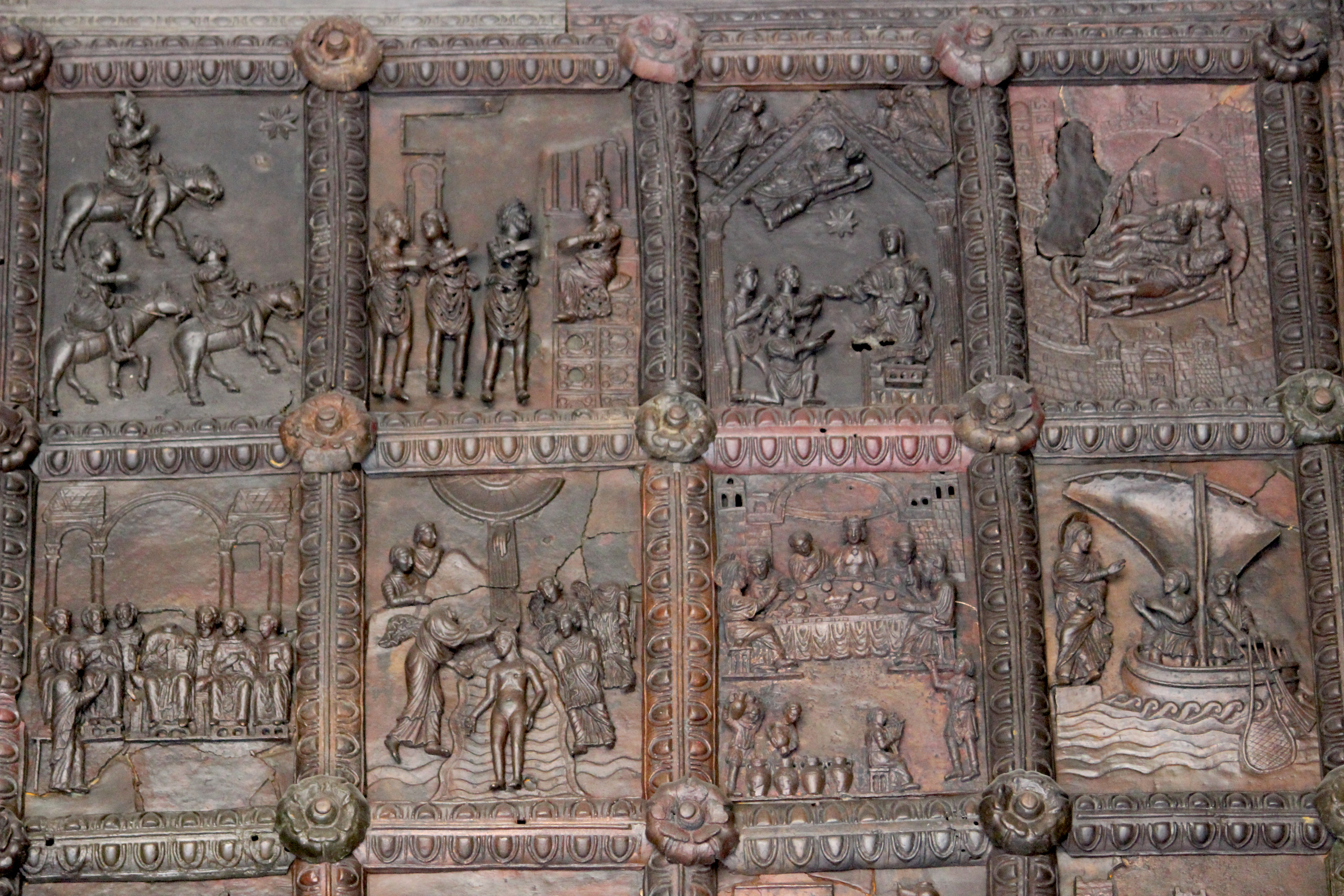 Benevento. Catedral, puerta de bronce románica, atribuida (al menos en parte) a Oderisio da Benevento. s. XII.